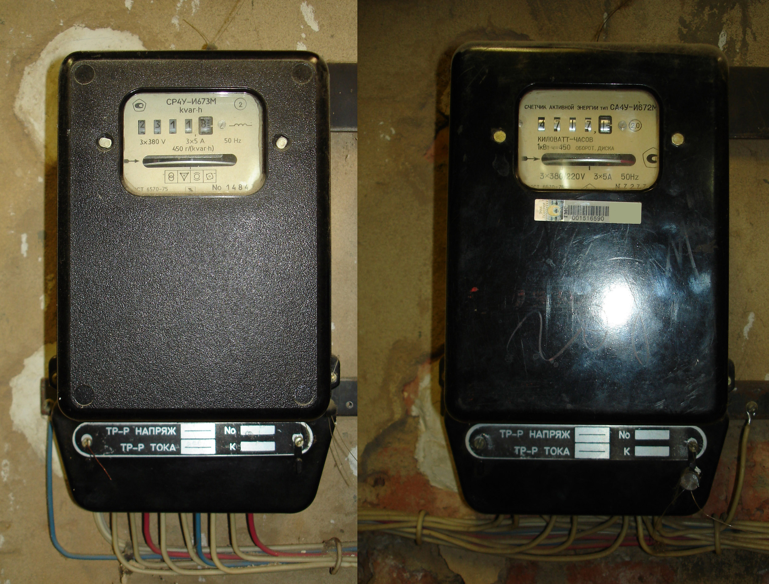 Две модели 3-фазных счетчиков